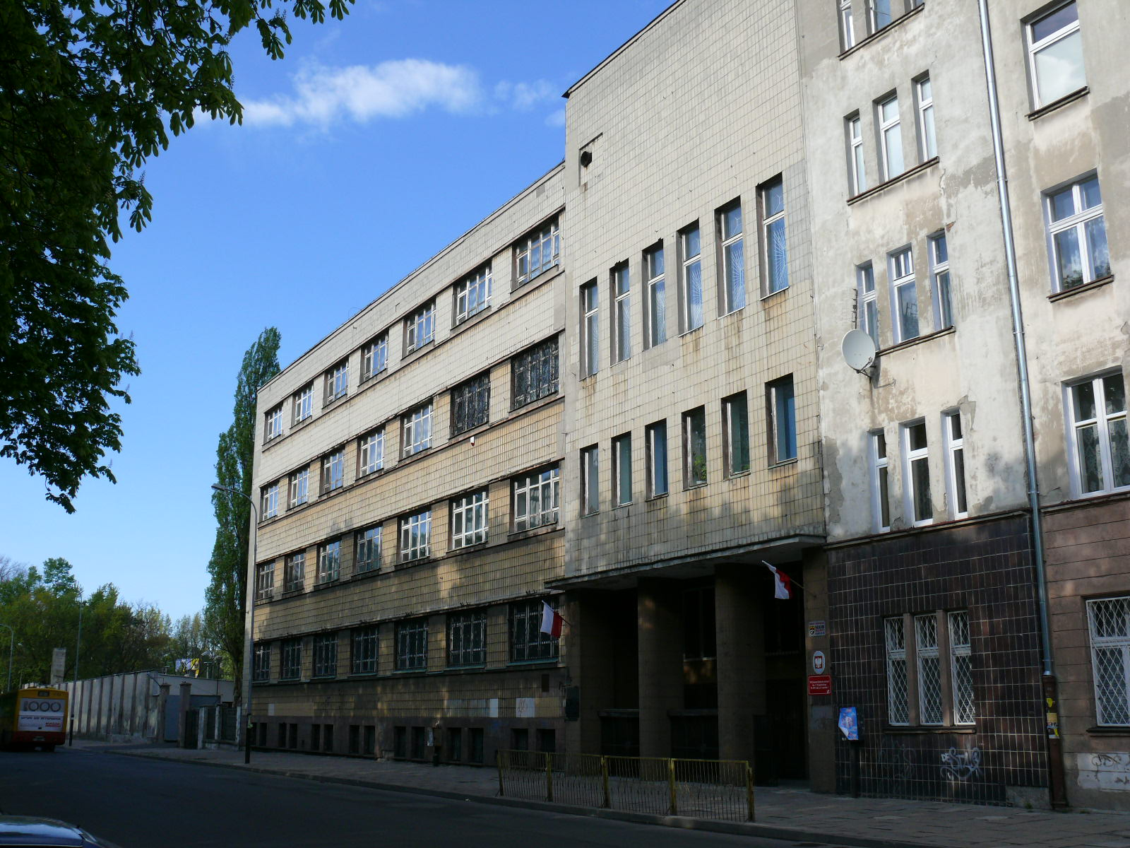 Budynek ul.Anstadta 7 w Łodzi (obecnie XII LO)